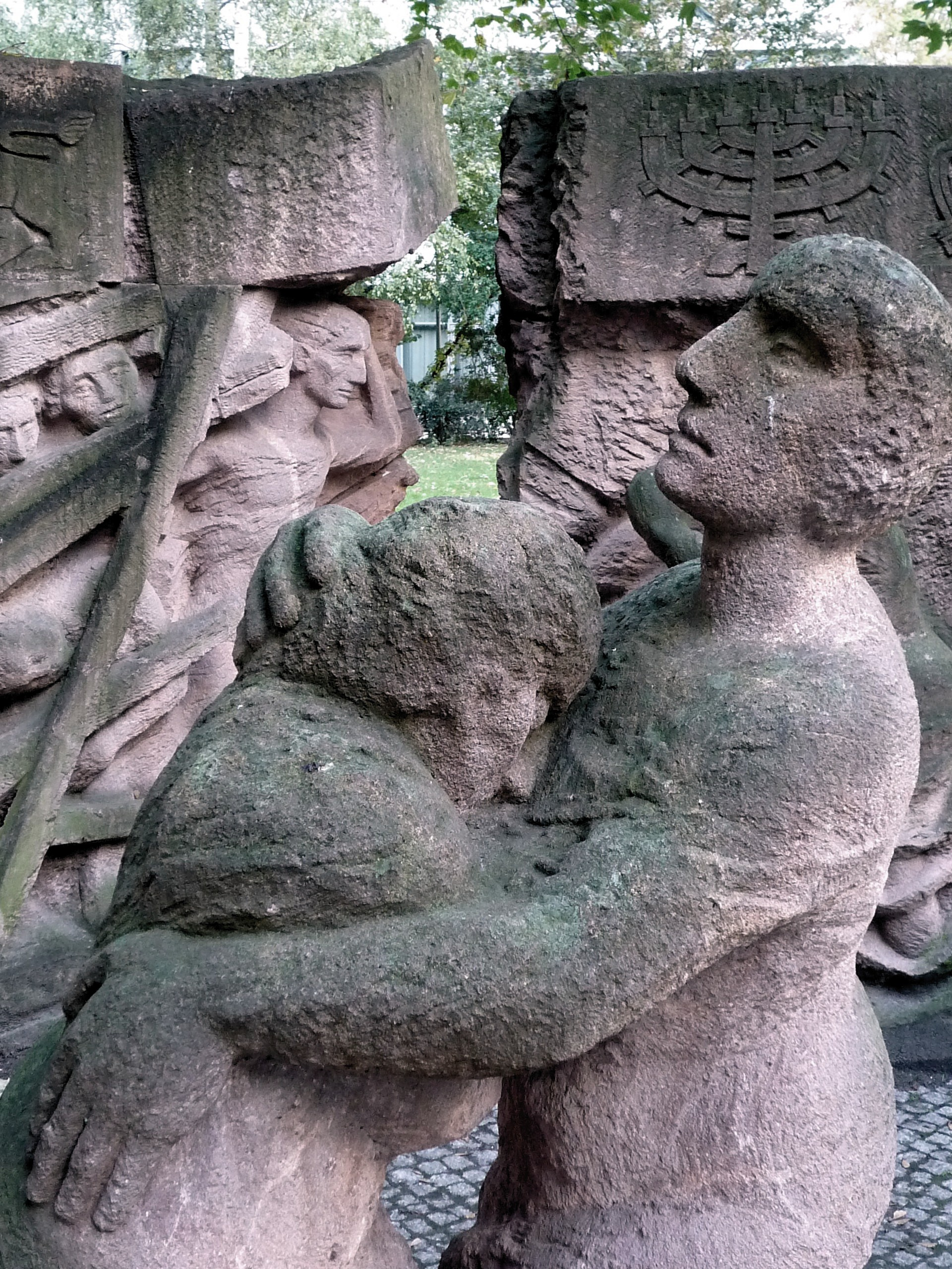 Skulptur "Block der Frauen" von Ingeborg Hunzinger in in der Rosenstraße in Berlin-Mitte, Detail. Das mehrteilige Denkmal erinnert an den Protest Berliner Frauen gegen die Verhaftung ihrer jüdischen Angehörigen 1943.